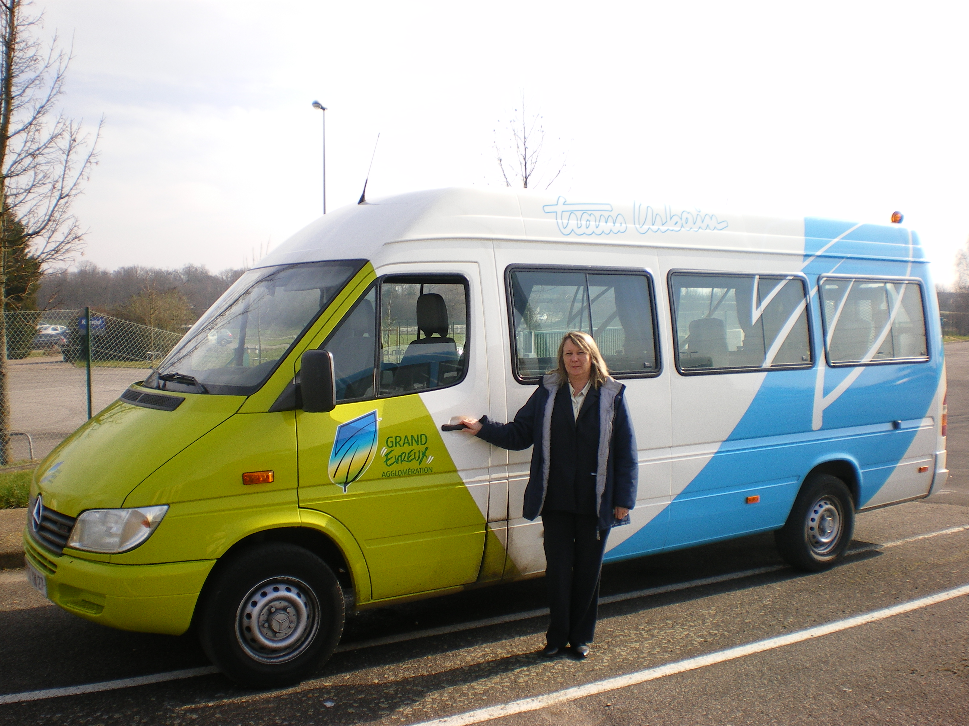 Service PMR